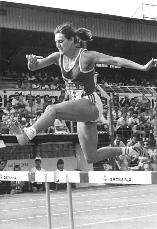 Sabine Busch ADN-ZB Kluge 28.6.86 Bez. Gera: DDR-Leichtathletik-Meisterschaften - Sabine Busch vom SC Turbine Erfurt gewann auf dem Ernst-Abbe-Sportfeld in Jena den 400-m-Hürdenlauf in sehr guten 53,85 s, nachdem sie bereits in einem Vorlauf mit einer Zeit von 53,62 s ihren bestehenden Weltrekord knapp verfehlt hatte.